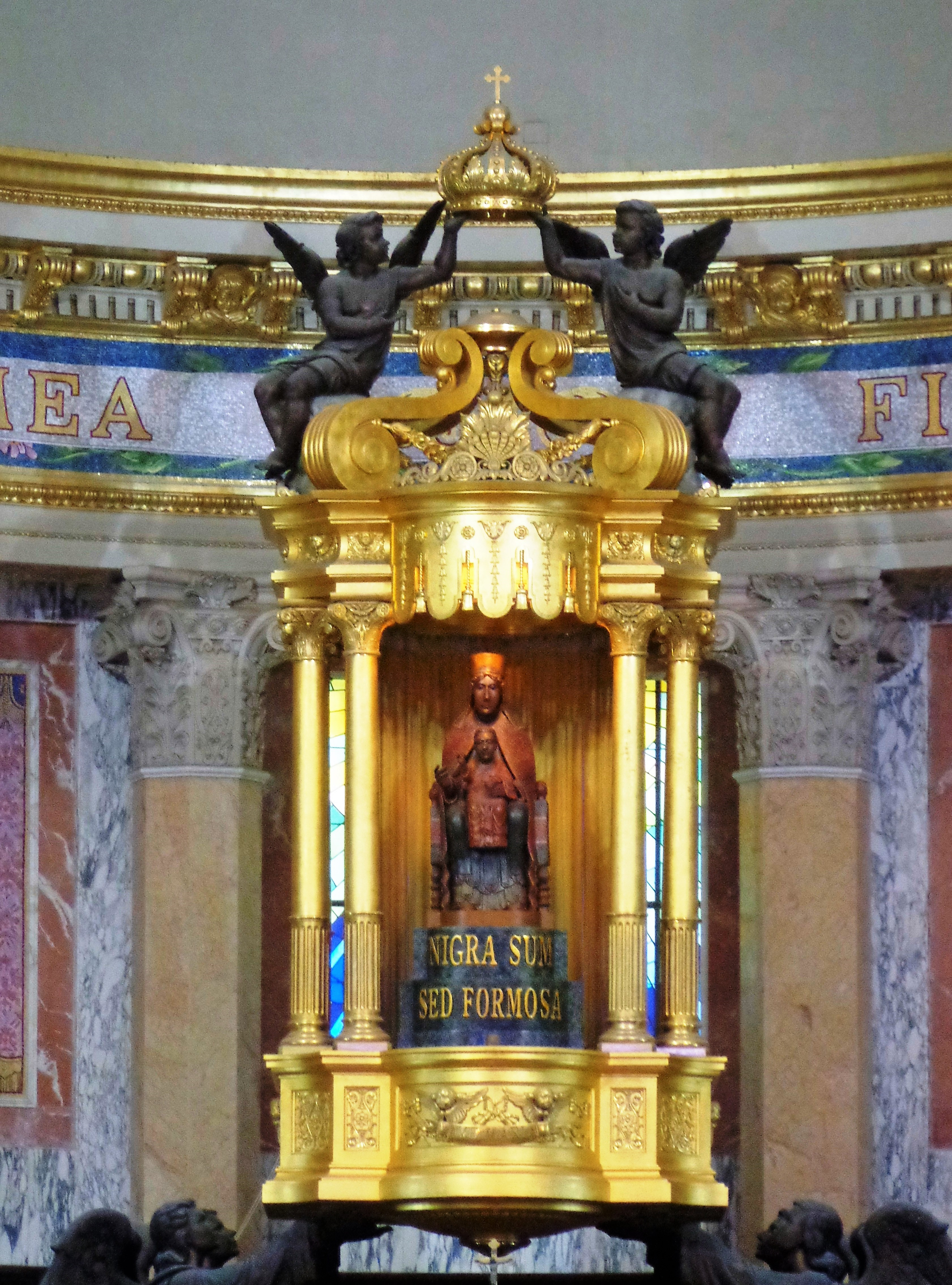 Sopraelevazione altare maggiore